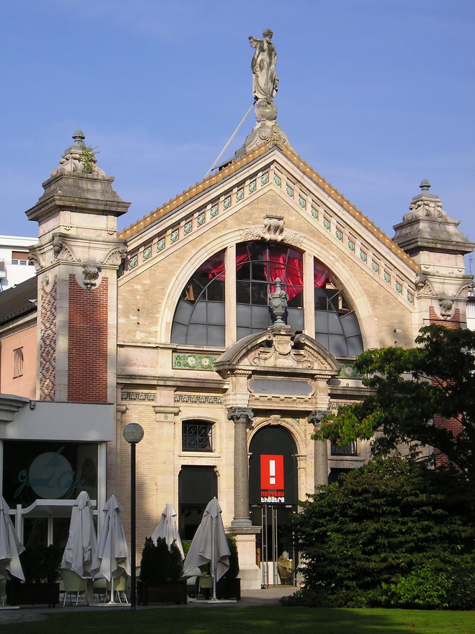 Nouveau Théâtre/Centre Dramatique National de Besançon